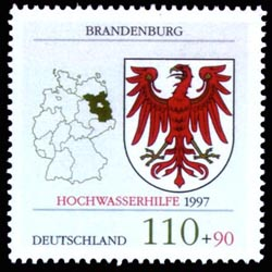 Wappen Brandenburgs und Umriss der Bundesrepublik Deutschland mit dem Zusatz "Hochwasserhilfe 1997"